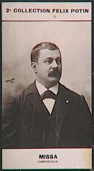 Der französische Komponist Edmond Missa (1861-1910)